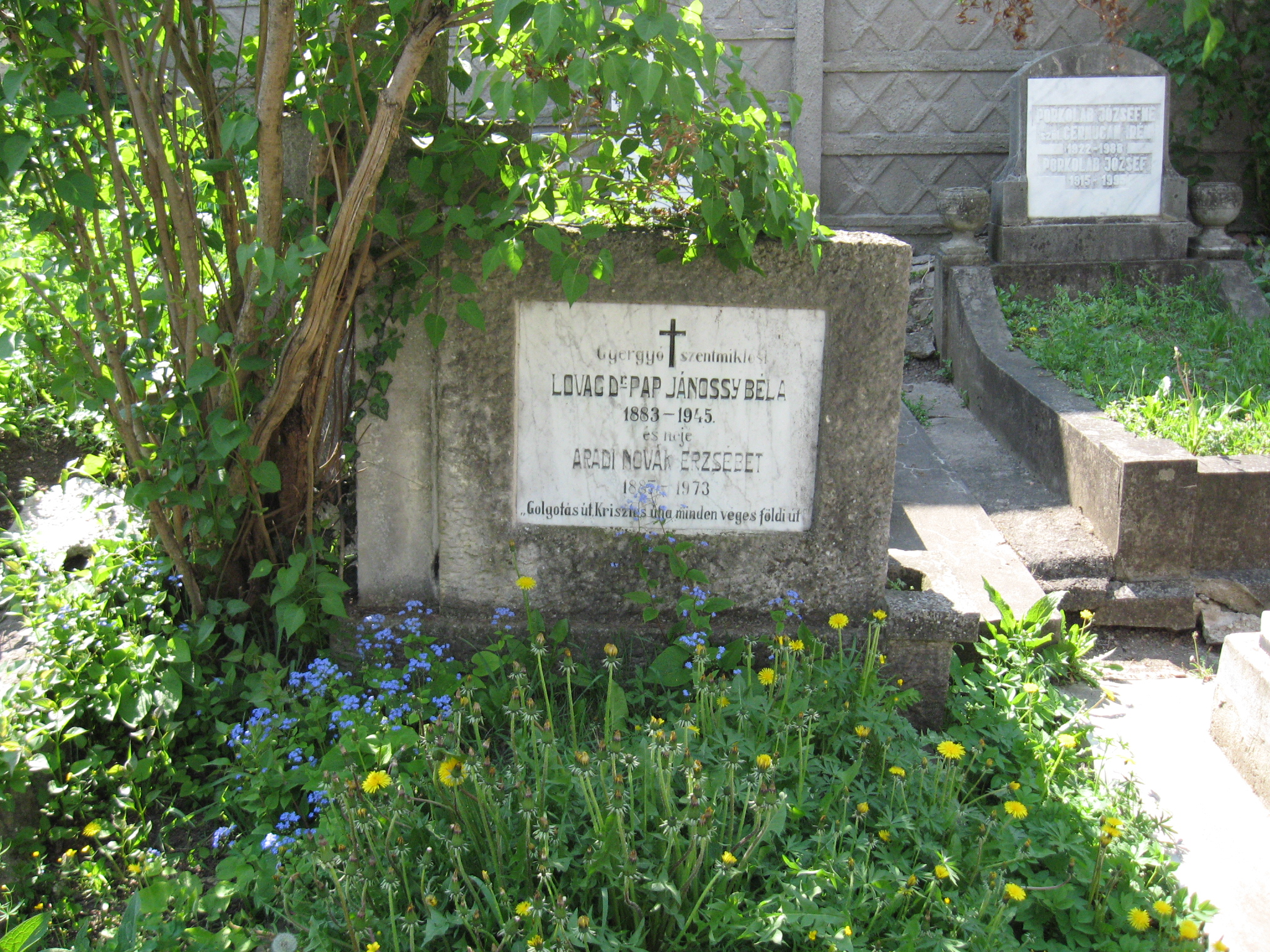 Házsongárdi temető: Pap Jánossy Béla sírja